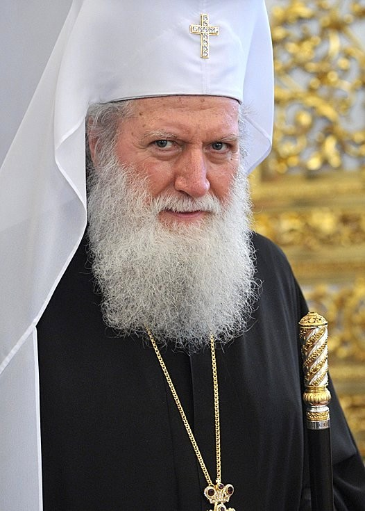 Патриарх Болгарский Неофит перед началом встречи с представителями поместных православных церквей